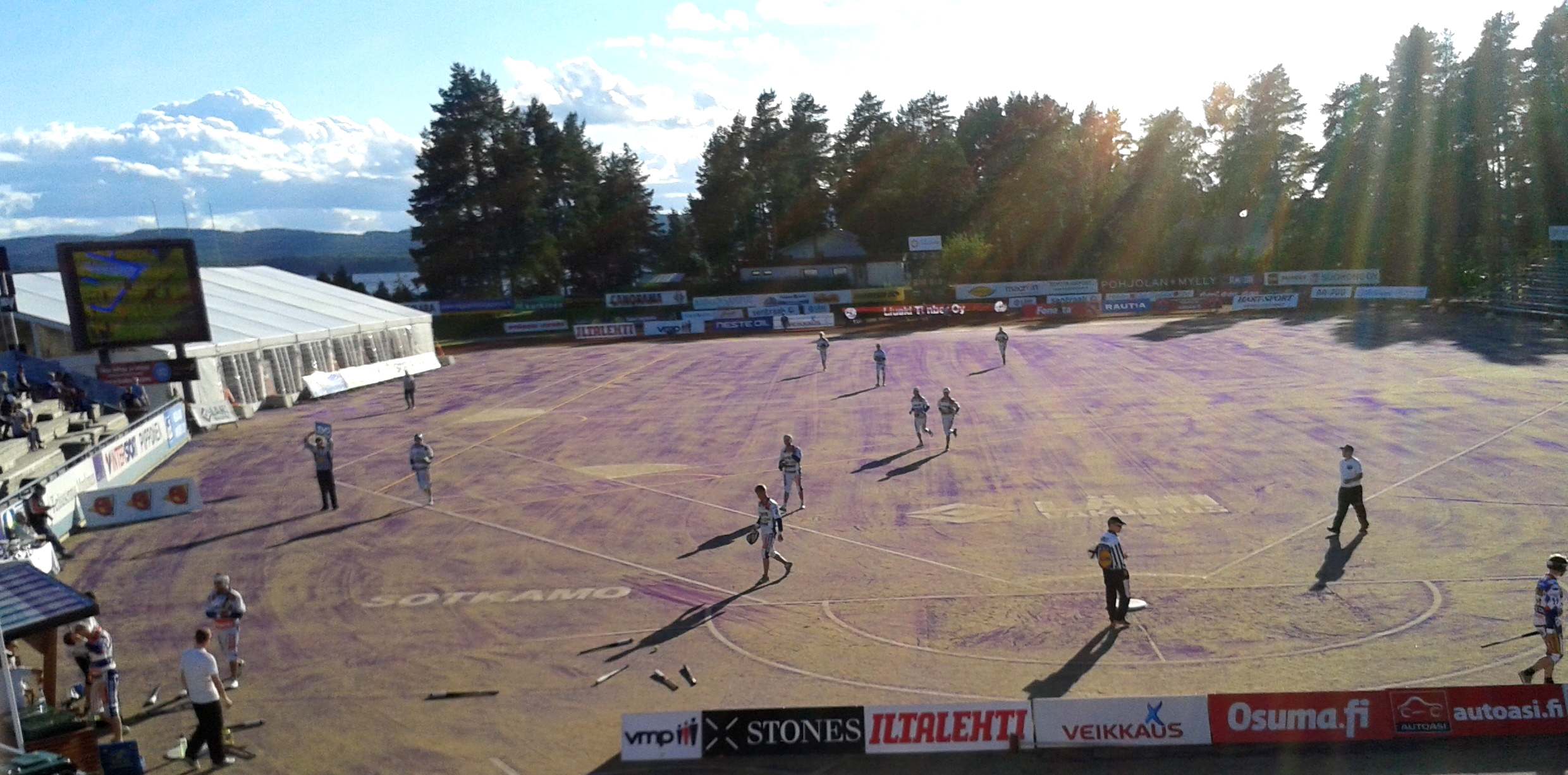 Kuva vuoden 2012 A-poikien Itä-Länsi-ottelusta, Sotkamon Hiukan pesäpallostadionilta.